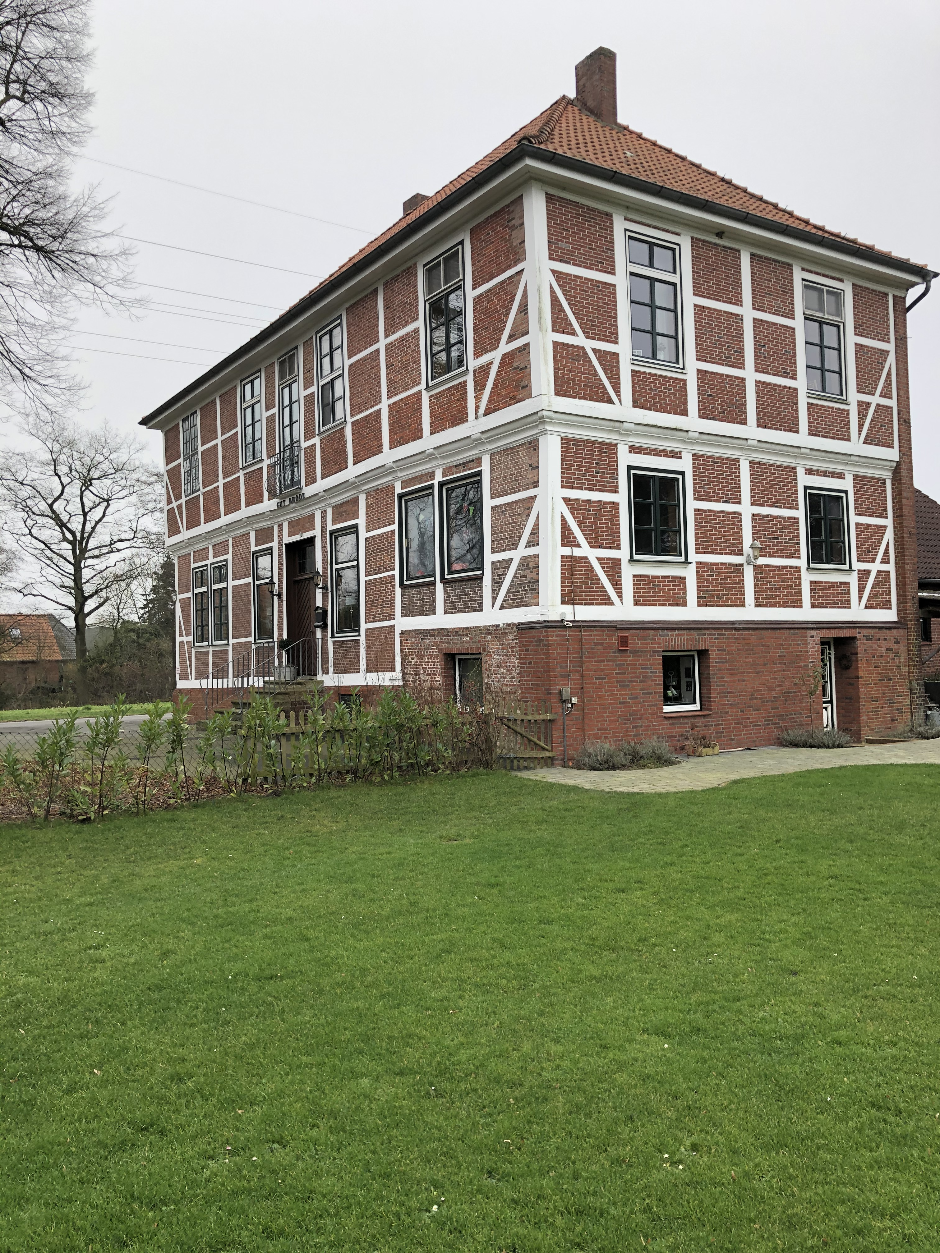 Gutshaus Gut Brook 2020 Wohnhaus